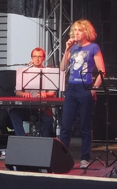 Rosa Enskat auf der Bühne vor dem Schauspielhaus Dresden zur Saisoneröffnung 2014